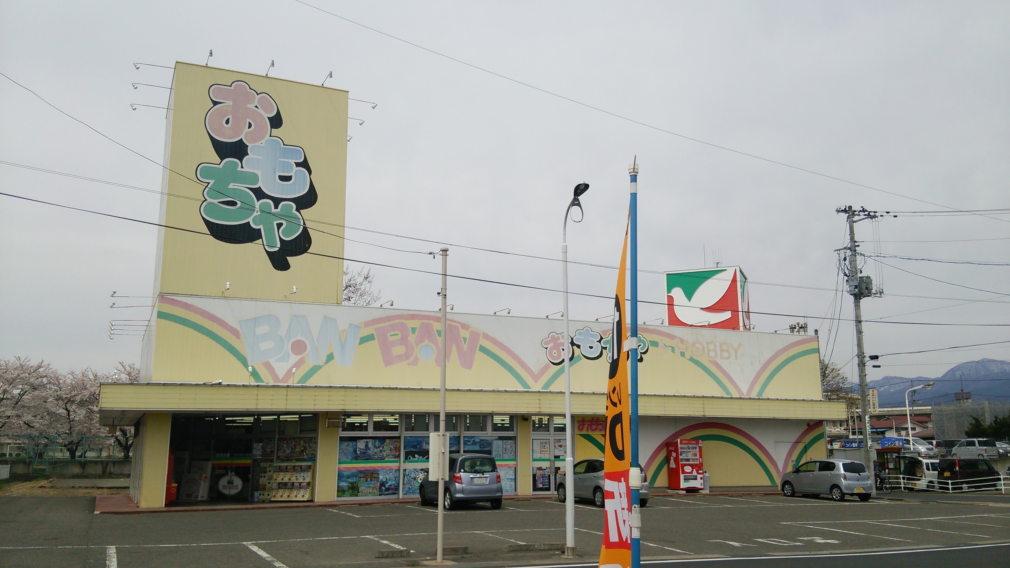 2014年4月20日投稿者が福島県喜多方市にて撮影